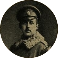 Евгений Александрович Шиловский поручиком.